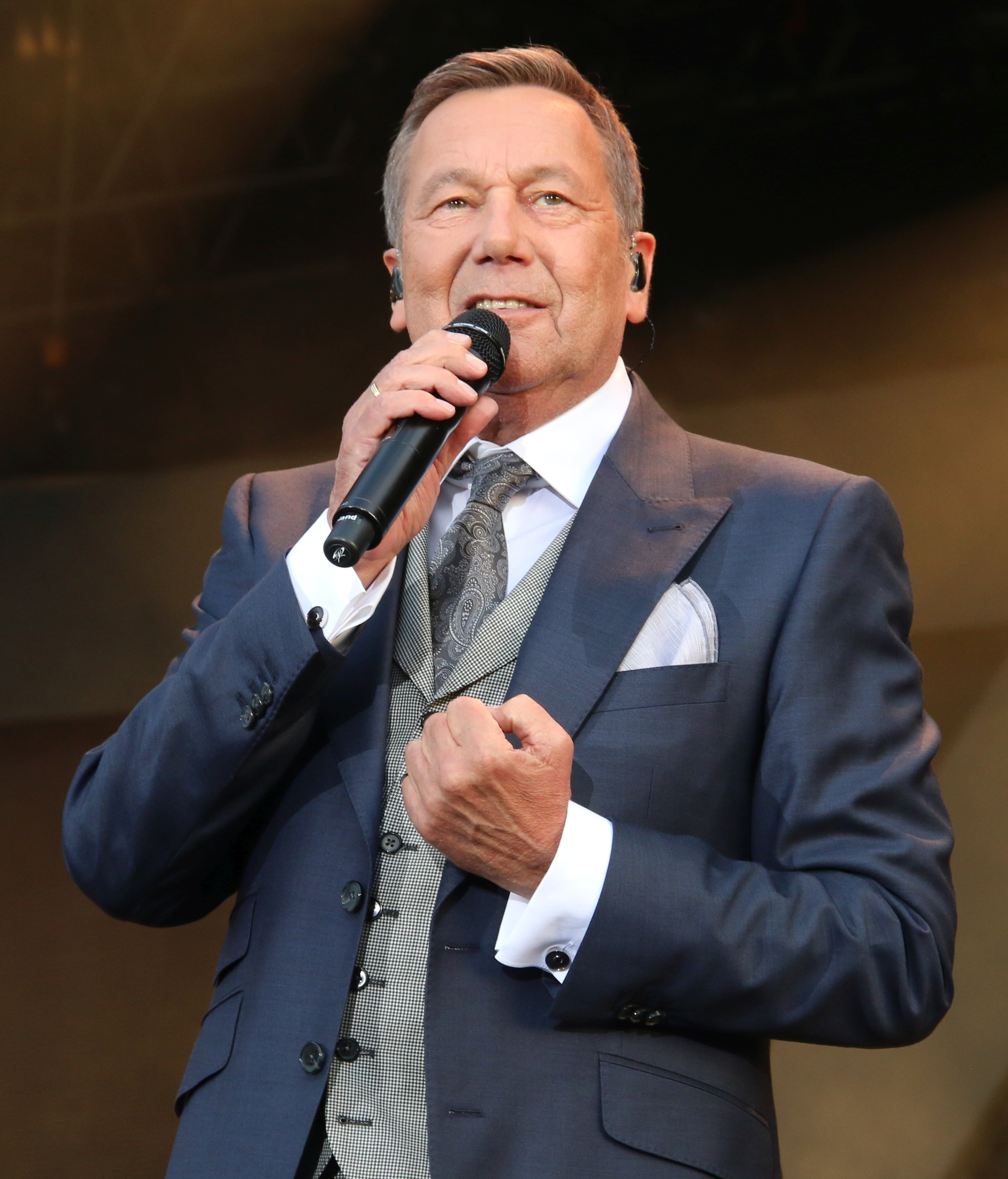 Roland Kaiser beim Konzert am Dresdner Elbufer (Kaisermania 2016); 29. Juli 2016